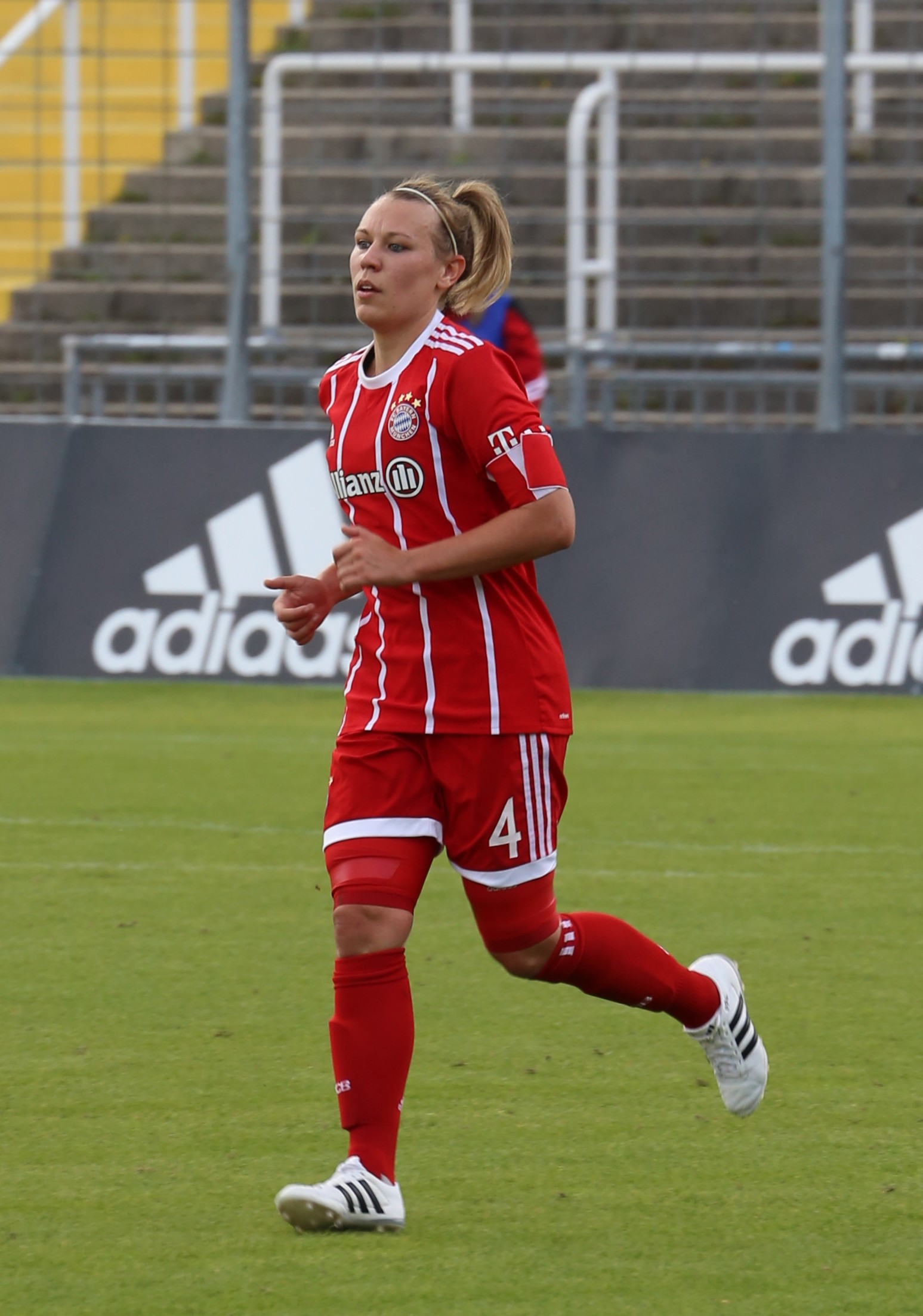 Kristin Demann beim Frauen-Bundesliga-Spiel FC Bayern München gegen 1. FC Köln am 24. September 2017 im Stadion an der Grünwalder Straße (Ergebnis war 2:0)